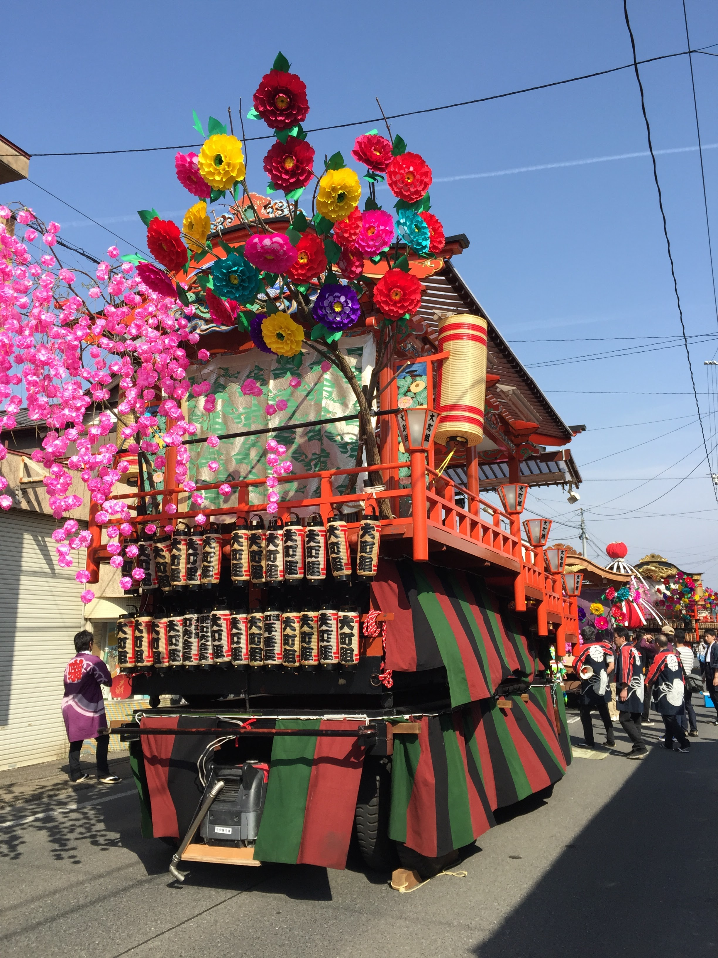 日高火防祭囃子屋台見返り（大町組）